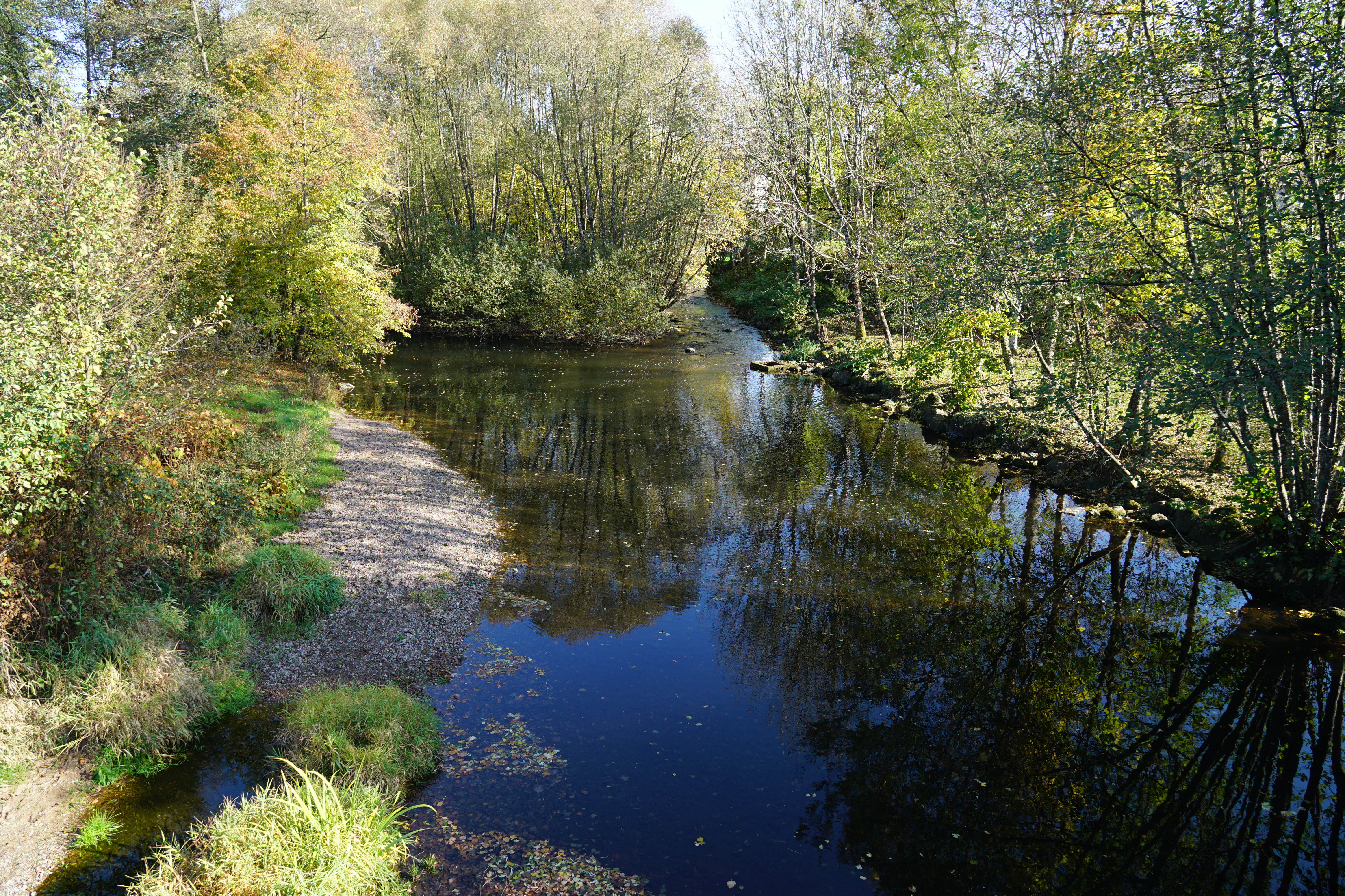 LOgnon à Montessaux.